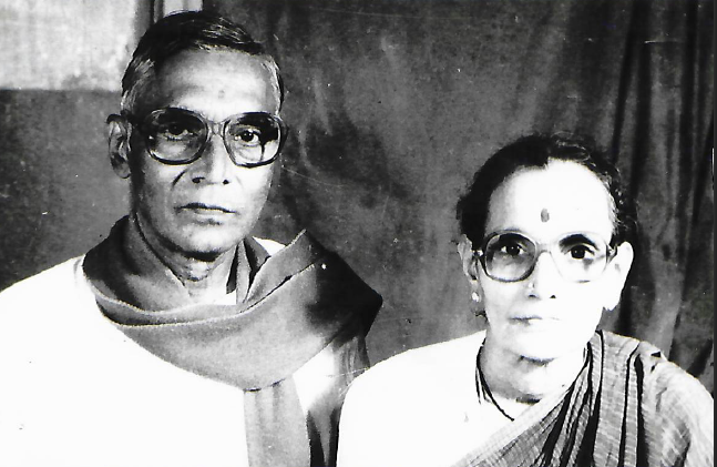 ప్రముఖ సంస్కృత, తెలుగు రచయిత జొన్నవిత్తుల రామకృష్ణశర్మ దంపతులు